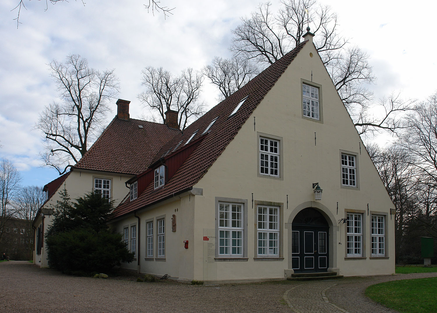 Focke-Museum Bremen: Haus Riensberg (zweite Hälfte 18. Jh.)